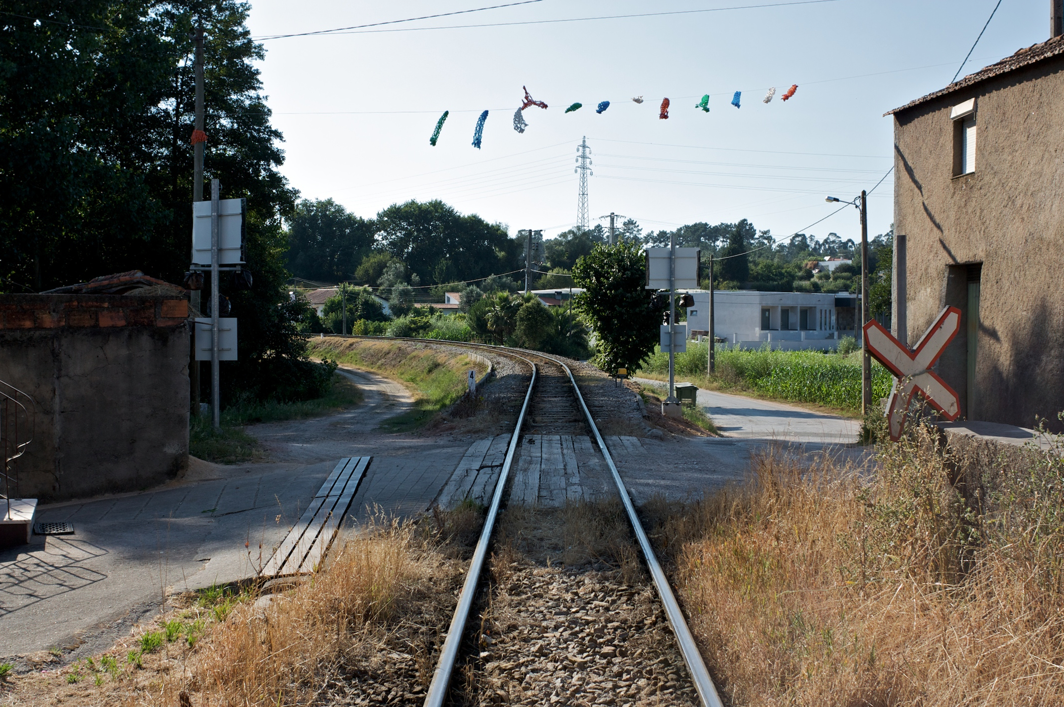 Via férrea: Linha do Vouga [PK 18] Local: Casal de Álvaro (Águeda) Data e hora: 6 de Julho de 2010 [18h19] Sentido: Aveiro